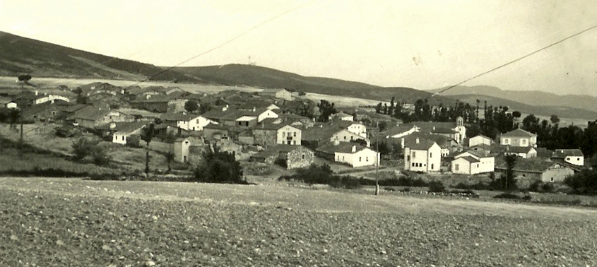 Así era el casco urbano de Robledillo en 1967, bastante diferente que el de hoy.